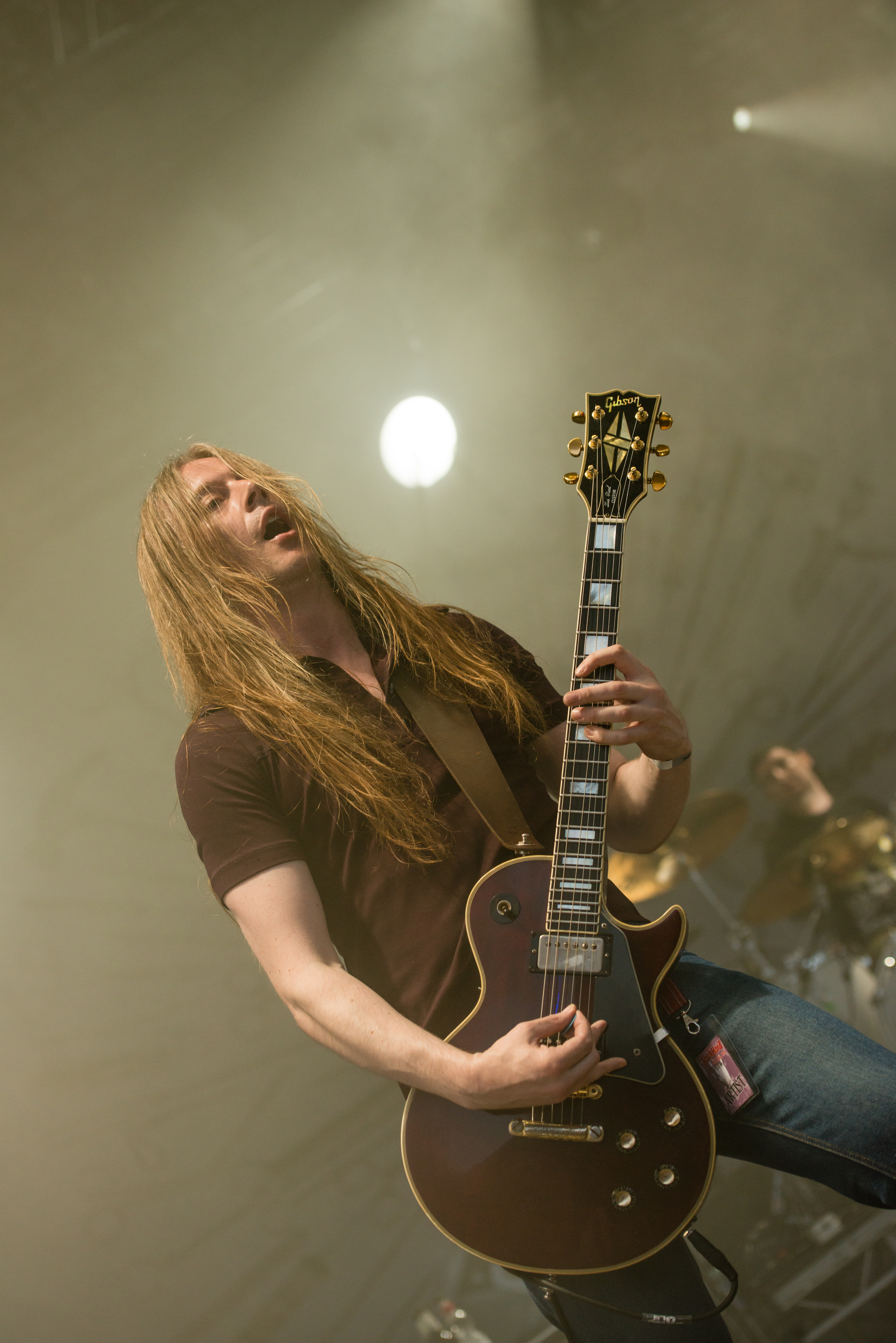 'Rock Hard Festival 2014 - Gelsenkirchen': 'Carcass'